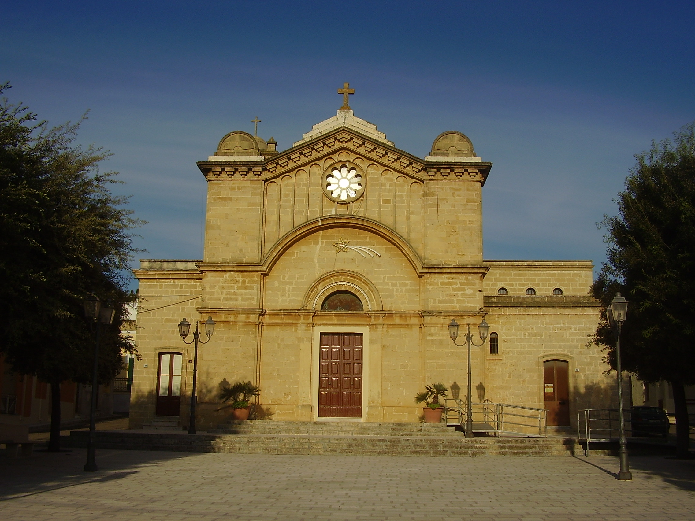 Chiesa San Biagio di San Simone, Lecce